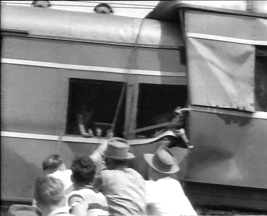 Sydenham Rail Disaster 1953